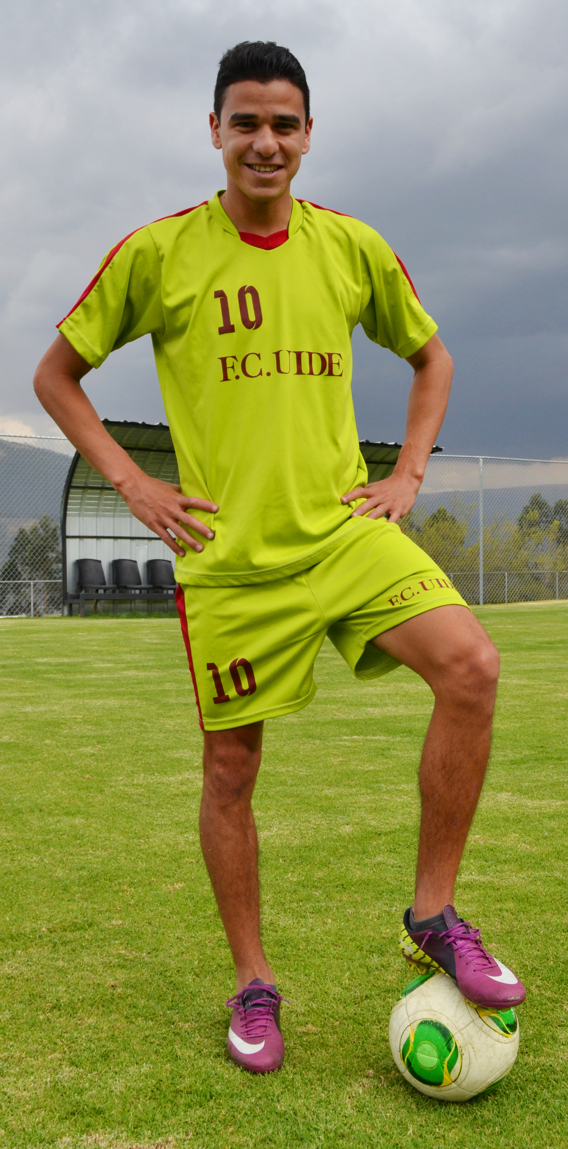 Paúl Plaza en la UIDE del 2012